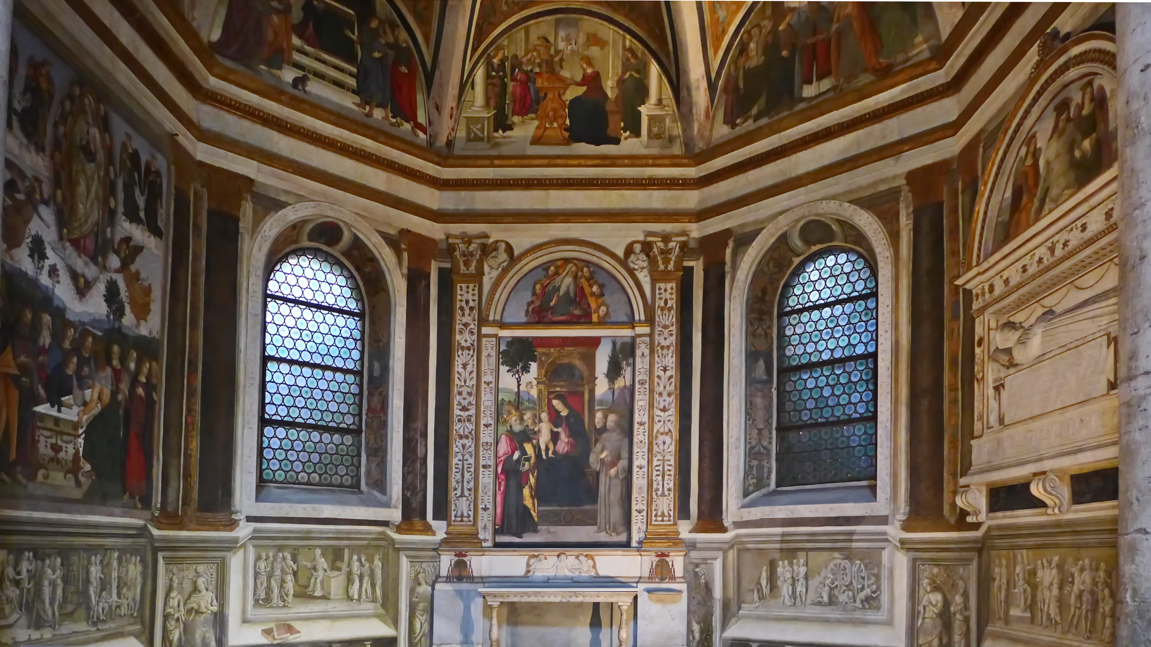 Santa Maria del Popolo Cappella Basso della Rovere